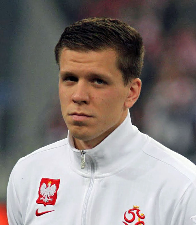 Wojciech Szczęsny przed meczem towarzyskim z reprezentacją Irlandii w listopadzie 2013.